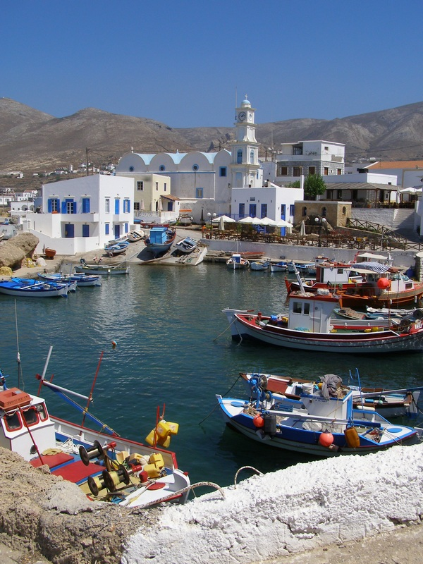 Den gamle havn i Fry.